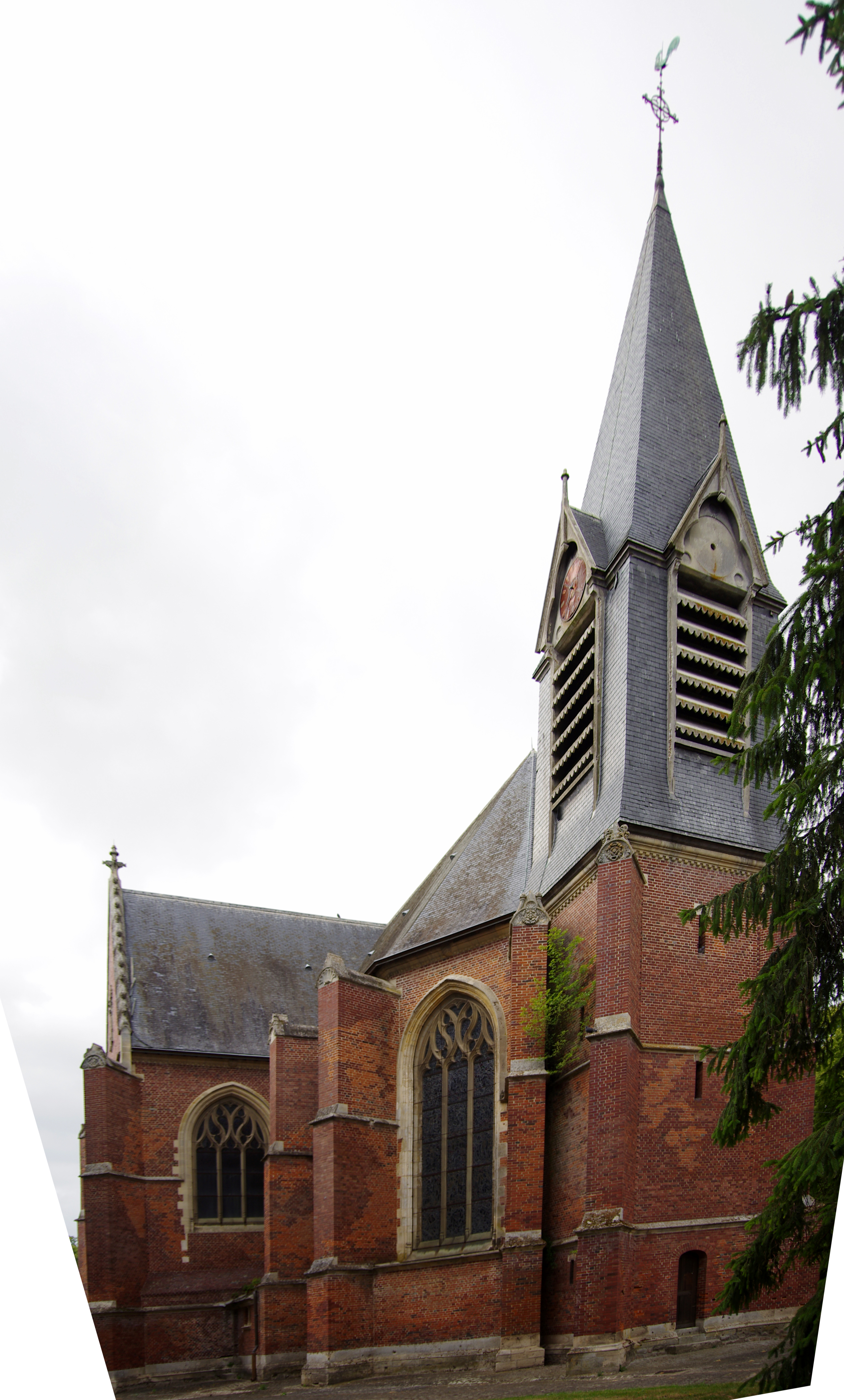 Tilloloy (Somme, France) - L'église Notre-Dame de Lorette vue depuis la rue. On remarque une certaine négligence d'entretien : un arbuste pousse dans l'angle, à mi-hauteur de l'édifice, et il manque un cadran d'horloge sur l'une des faces du clocher. L'autre cadran visible ici est passablement rouillé.